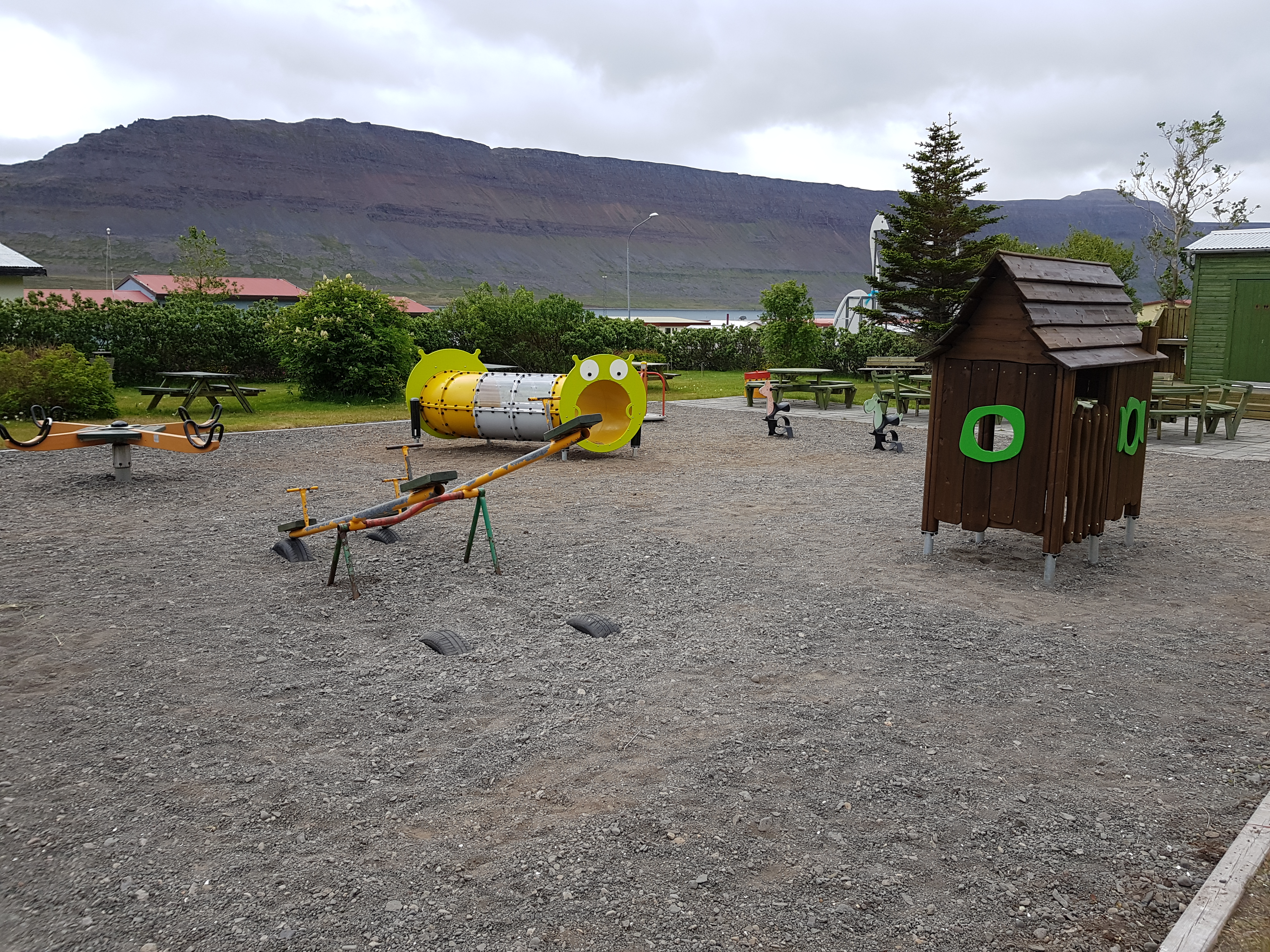 Raggagarður í Súðavík.